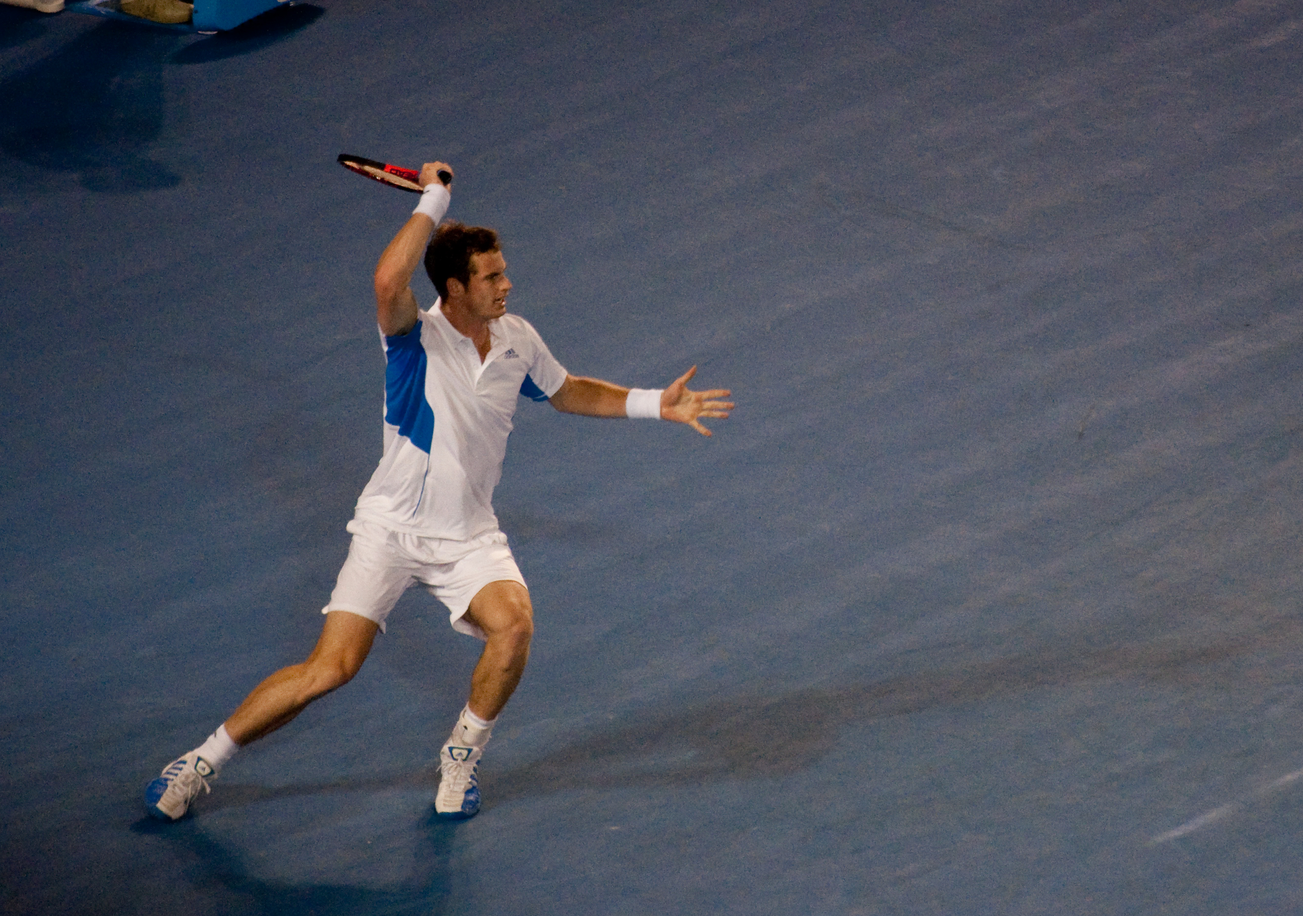 Australian Open 2010 Quarterfinals Nadal Vs Murray